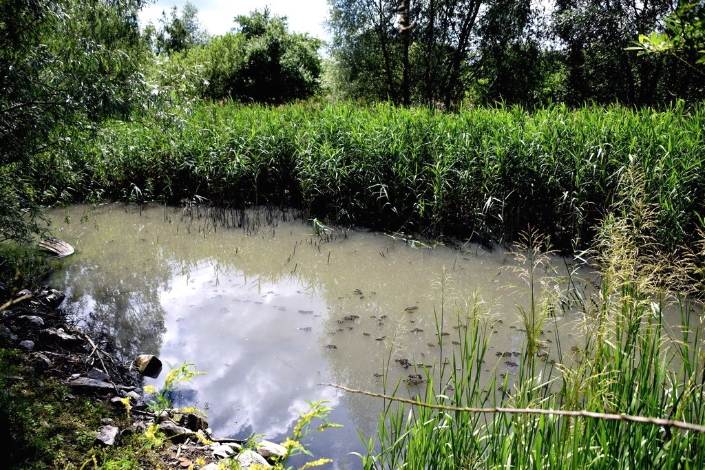 Teich hinter Möbel Boss in Frankfurt (Oder)